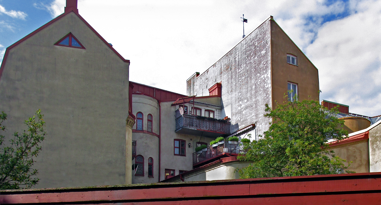 Husgavlar mot söder på två fastigheter i Ystad.